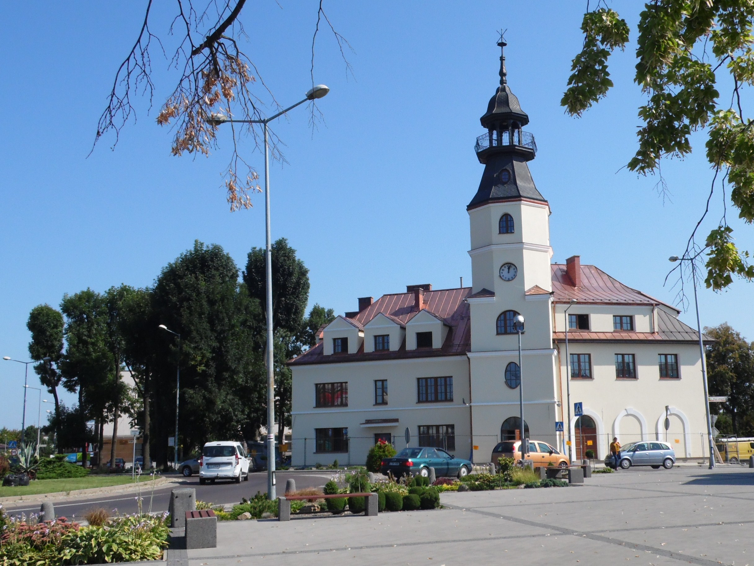 Ratusz w Rynku.